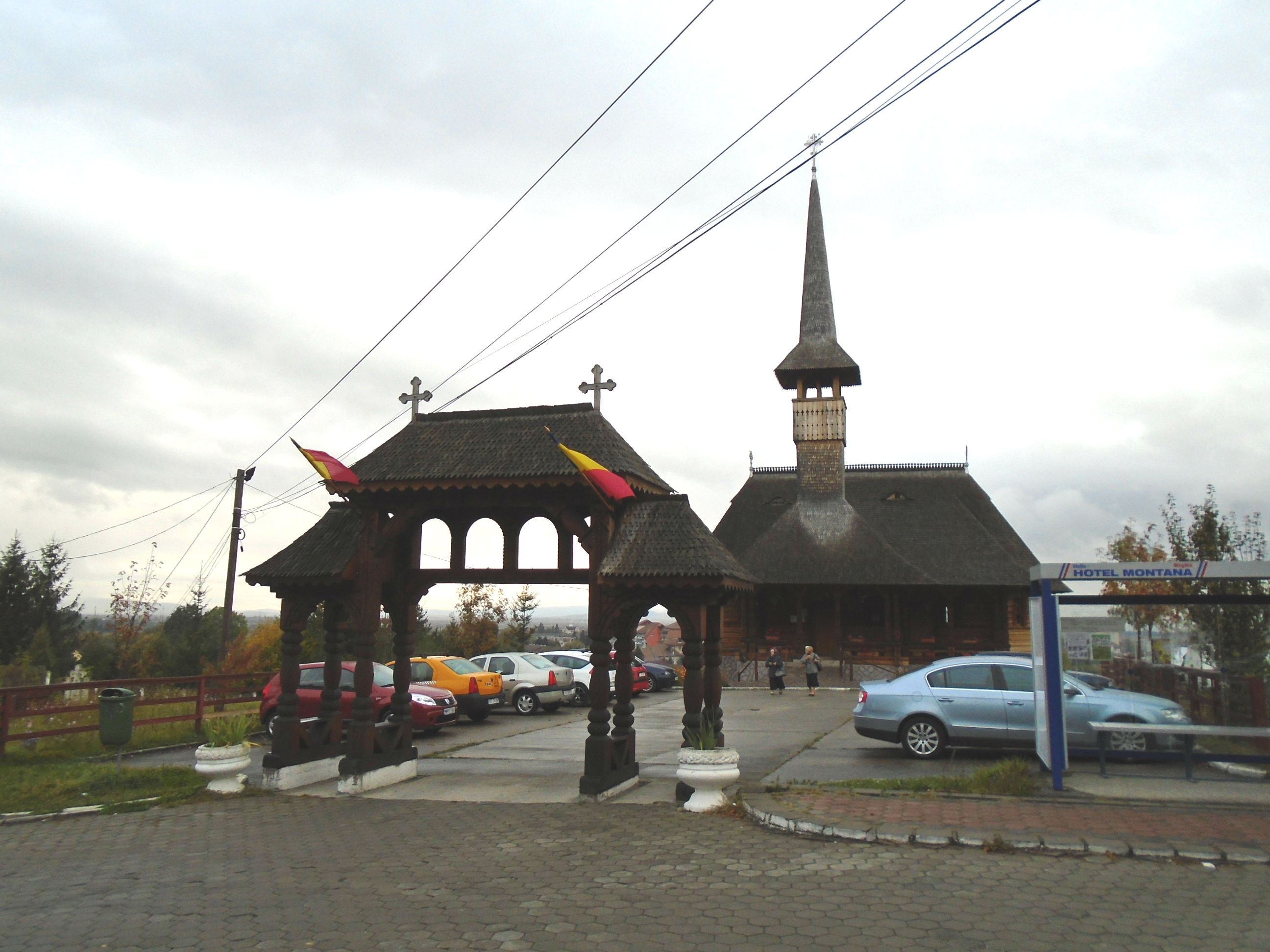 Biserica ortodoxă din Covasna Staţiune, având hramul Izvorul Tămăduirii